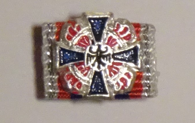 Bandsteg zum Deutsches Feuerwehr-Ehrenkreuz in Silber.*Orden *Ehrenzeichen *Feuerwehr *Verband *DFV